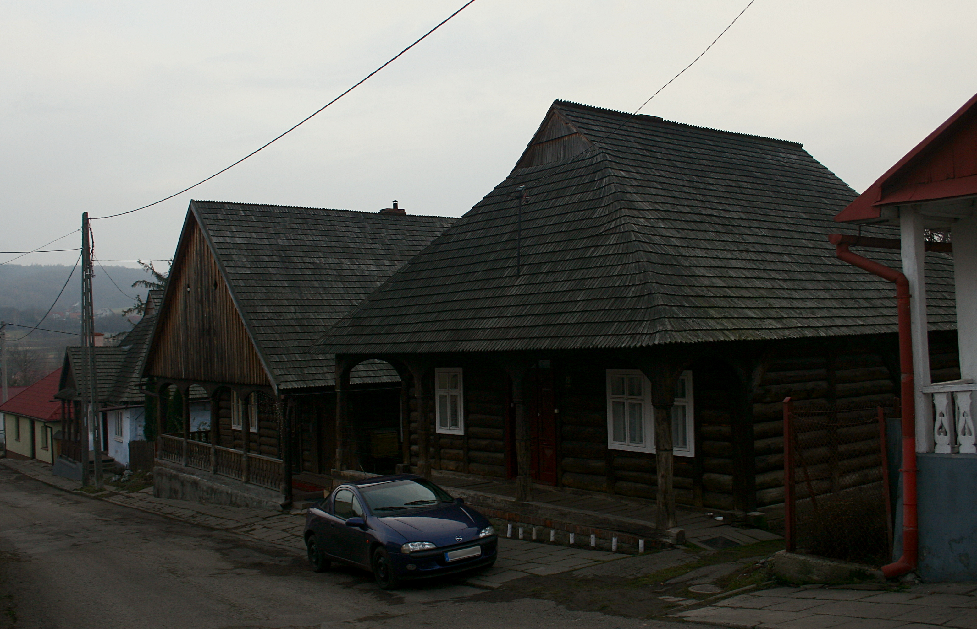 Domy w zabudowie rynku w Pruchniku